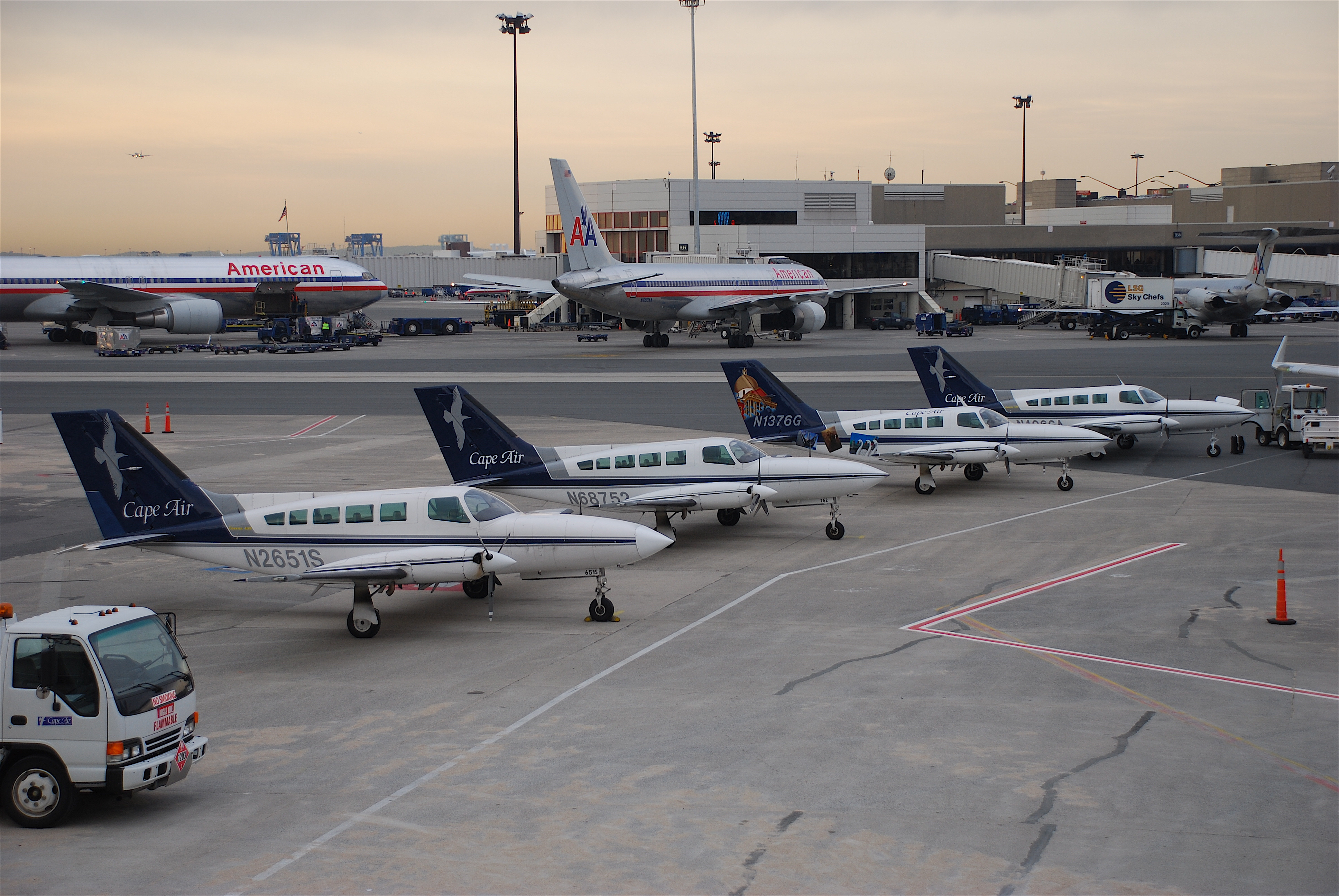 Cape Air Cessna 402C; N2651S@BOS;04.02.2008/497ac